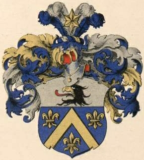 Brömseni suguvõsa aadlivapp